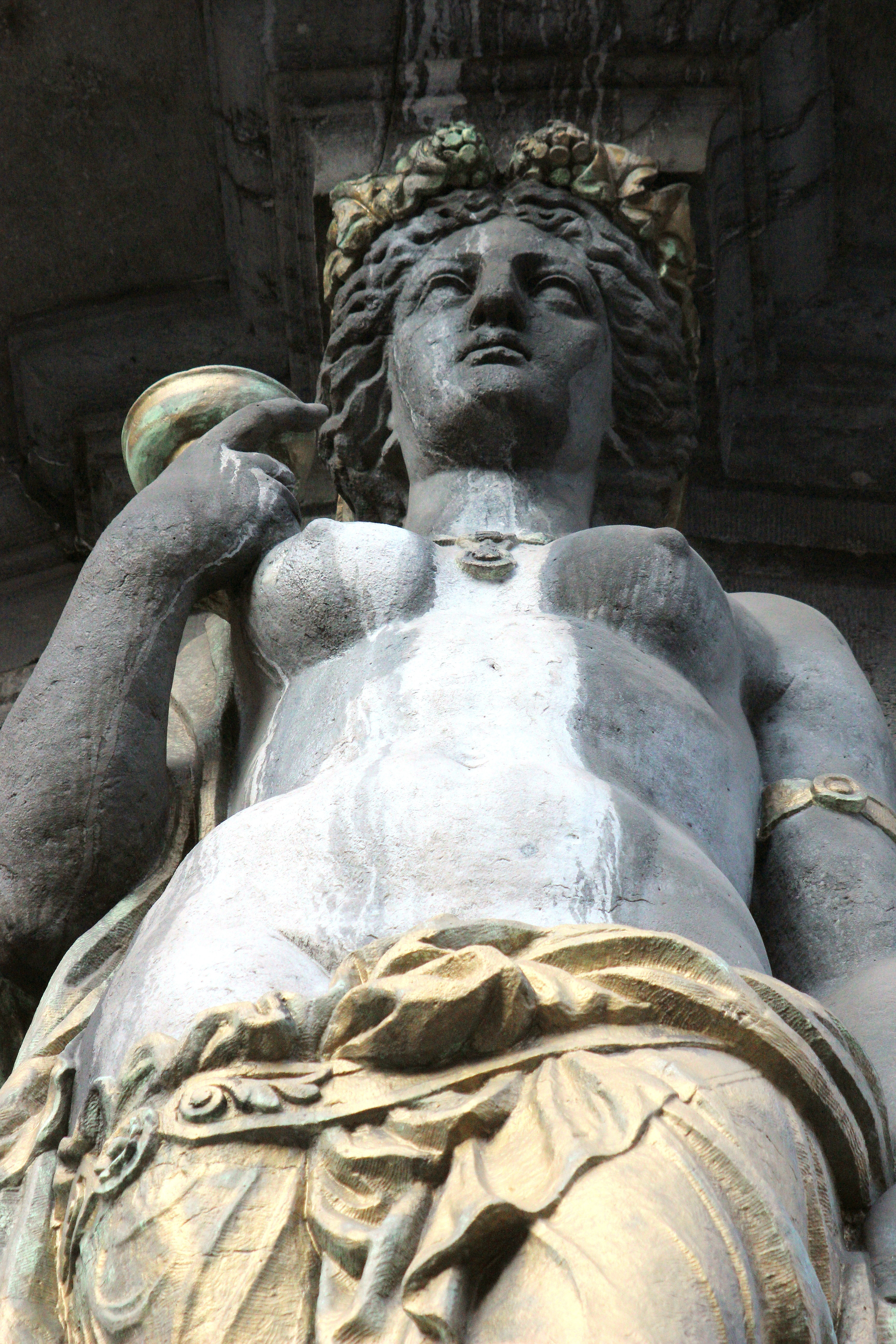 Boulevard Adolphe Max, 28-34, Bruxelles (Belgique). Détail : caryatide